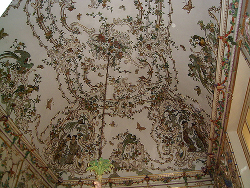 Il Salottino di Porcellana realizzato dalla Real Fabbrica di Capodimonte (porcellana dipinta e dorata, e soffitto in stucco, m 6,75 x 4,80 x 5,13, mq 81), si trova a Napoli nel Museo di Capodimonte (inv. OA 1382), sezione Appartamento Reale (Primo Piano, Sala 52). Il cabinet di porcellana fu commissionato alla Real Fabbrica della Porcellana di Capodimonte dalla regina Maria Amalia di Sassonia per adornare la sala del boudoir del suo appartamento privato nella Reggia di Portici. L'ambiente fu portato a compimento tra il 1757 ed il 1759. Nel 1866, il rivestimento in porcellana della stanza fu smontato e rimontato nella Reggia di Capodimonte.